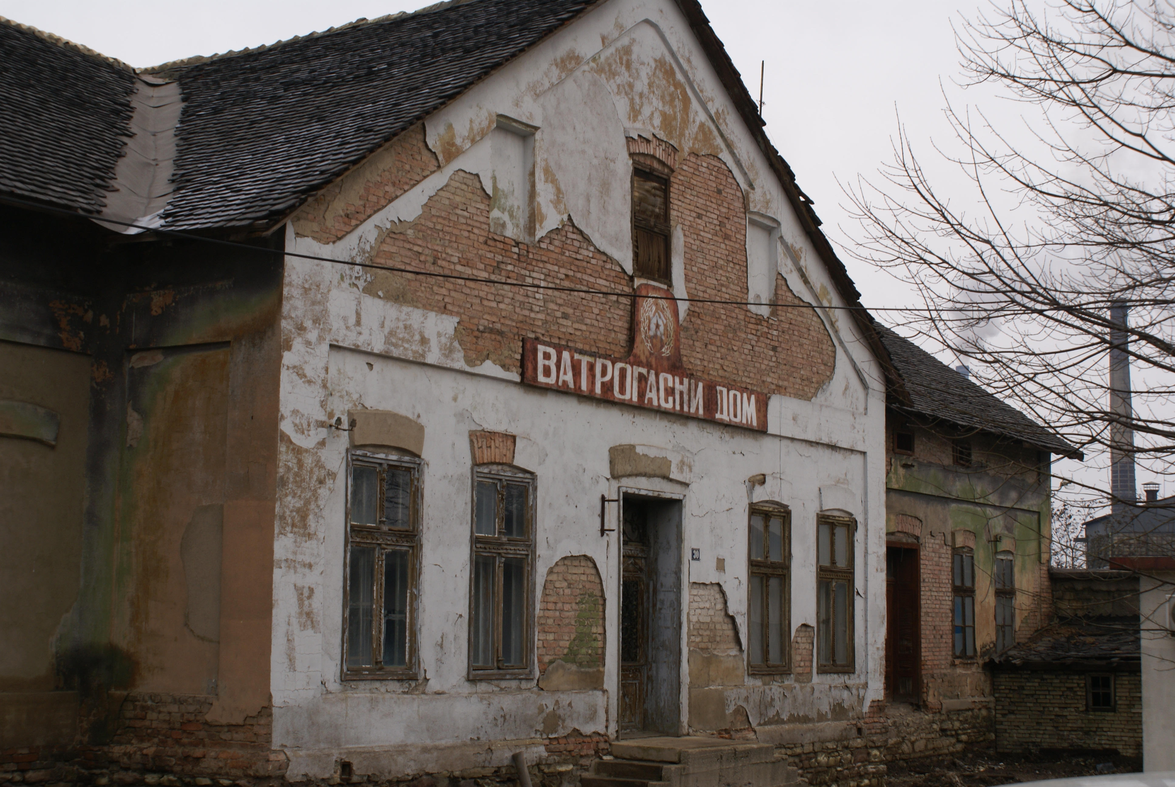 Српски (ћирилица): Весели рудар поглед са стране крупно